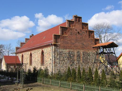 Dobra - rzymskokatolicki kościół parafialny p.w. Matki Bożej Królowej Świata, 2 poł. XIII, 1879 (widok z płd.-wsch)